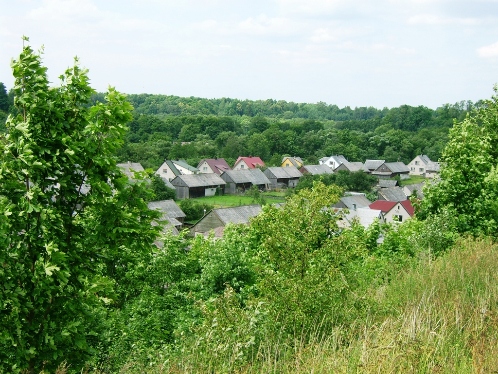 Pagramantis